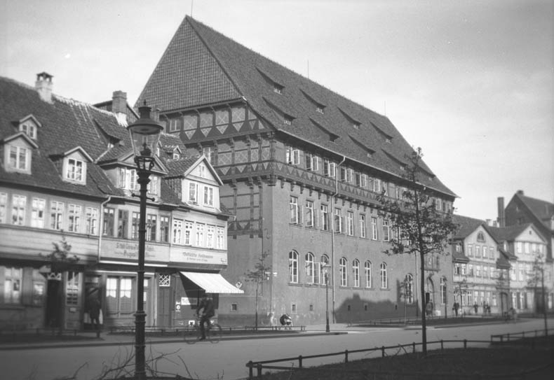 Motiv: Braunschweig Kategori: Stadsmiljö Braunschweig